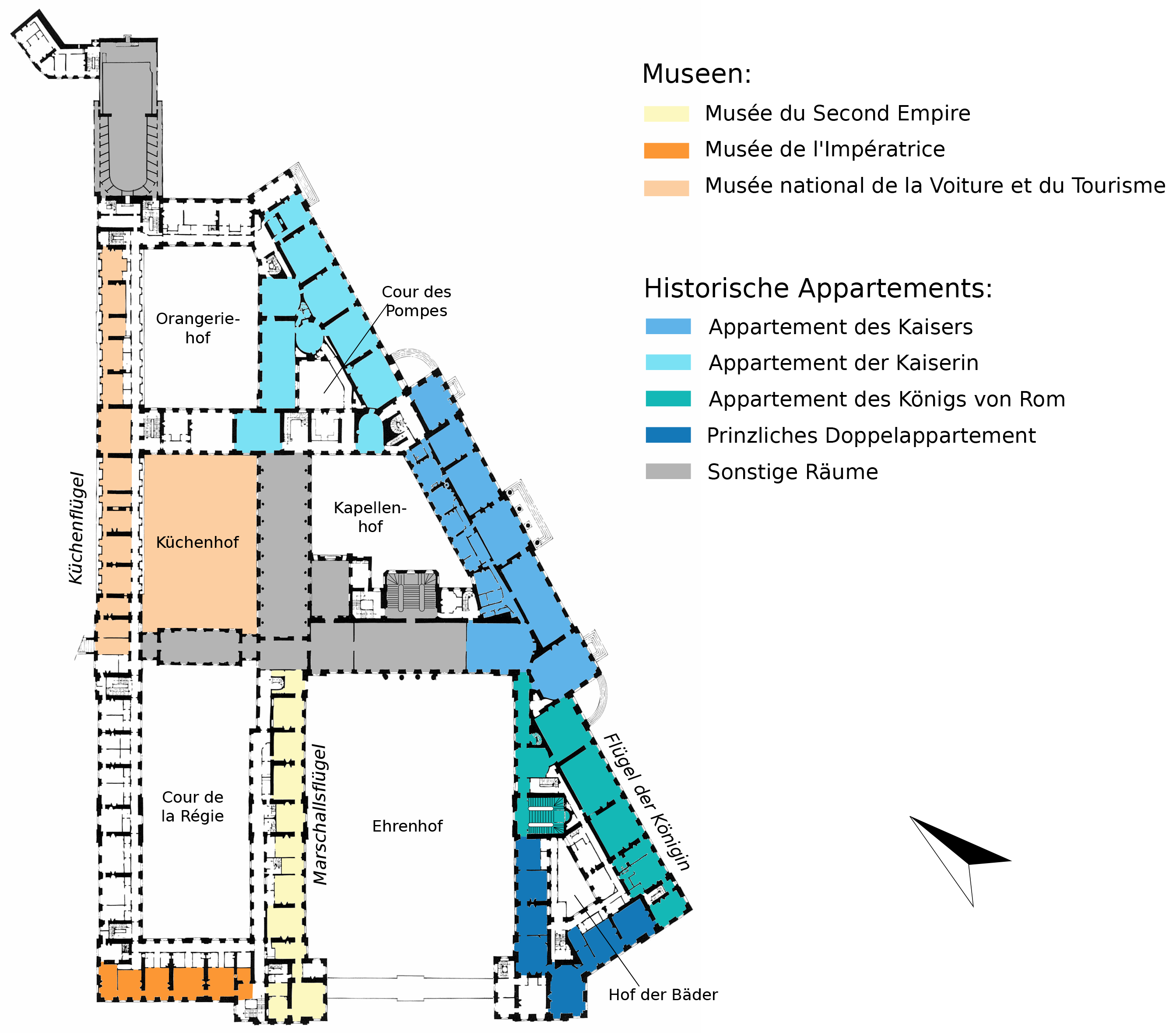 Grundriss des Schlosses Compiègne